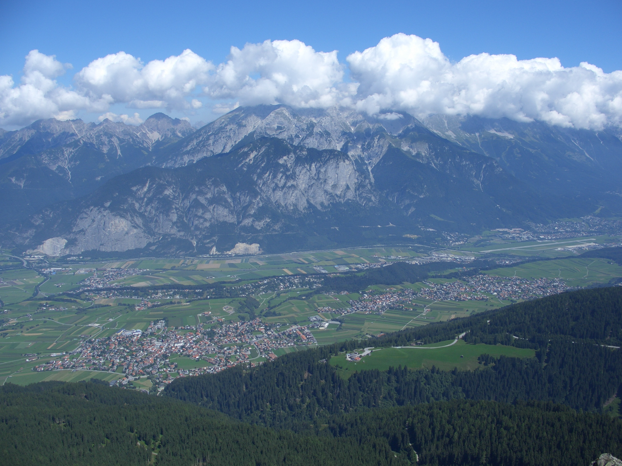 Axams seen from Axamer Kögele